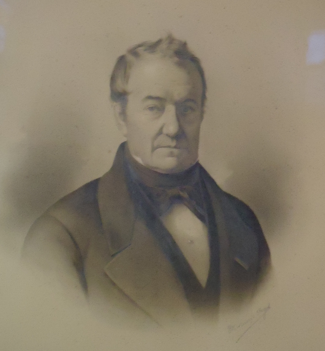 Portrait de Louis Frédéric Japy au Musée Japy à Beaucourt